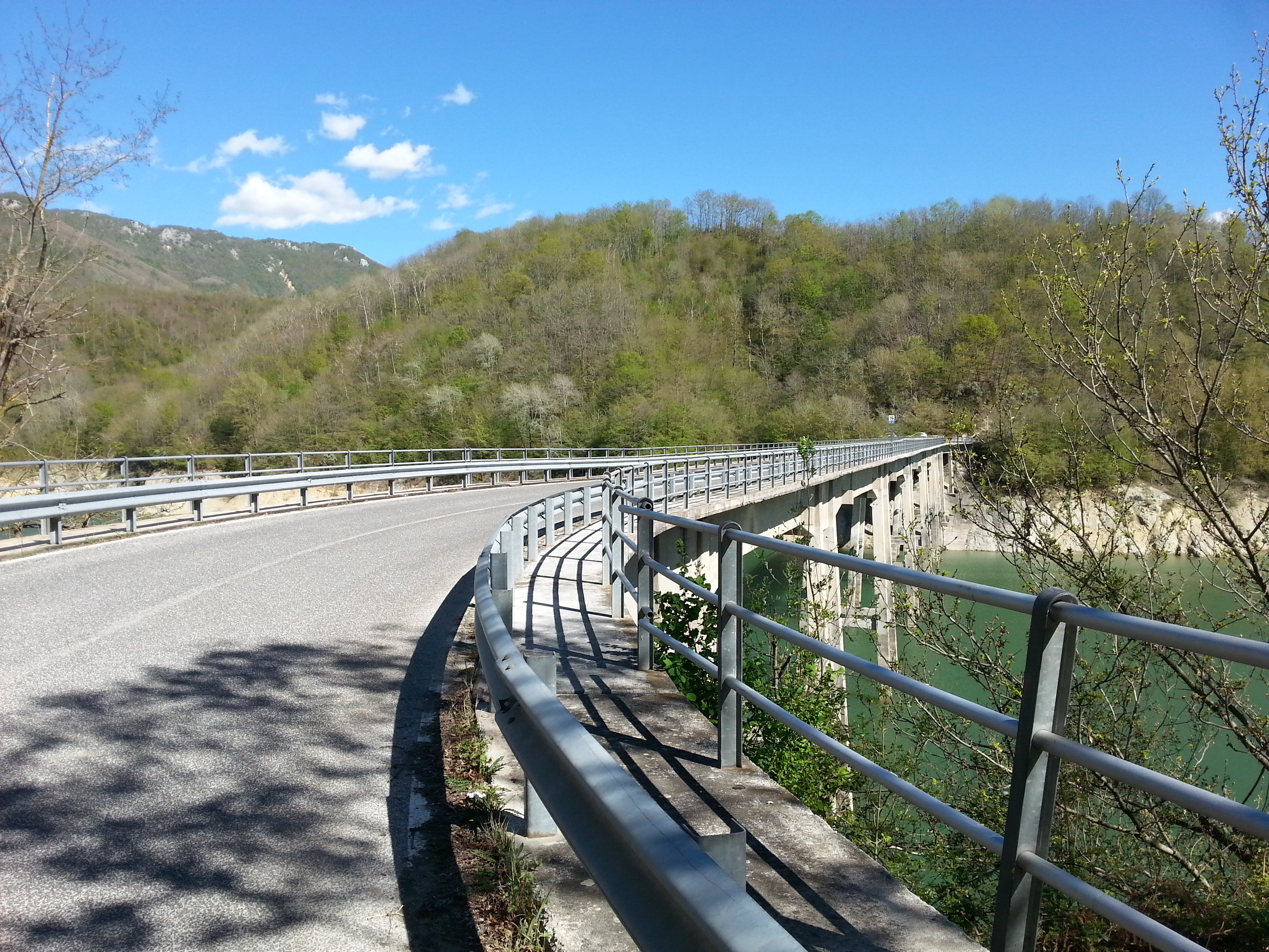 Il Ponte della Moletta, che attraversa un'insenatura del Lago del Salto nei pressi di Borgo San Pietro (frazione di Petrella Salto), posto al km 16 della strada provinciale 67 "Salto Cicolana"